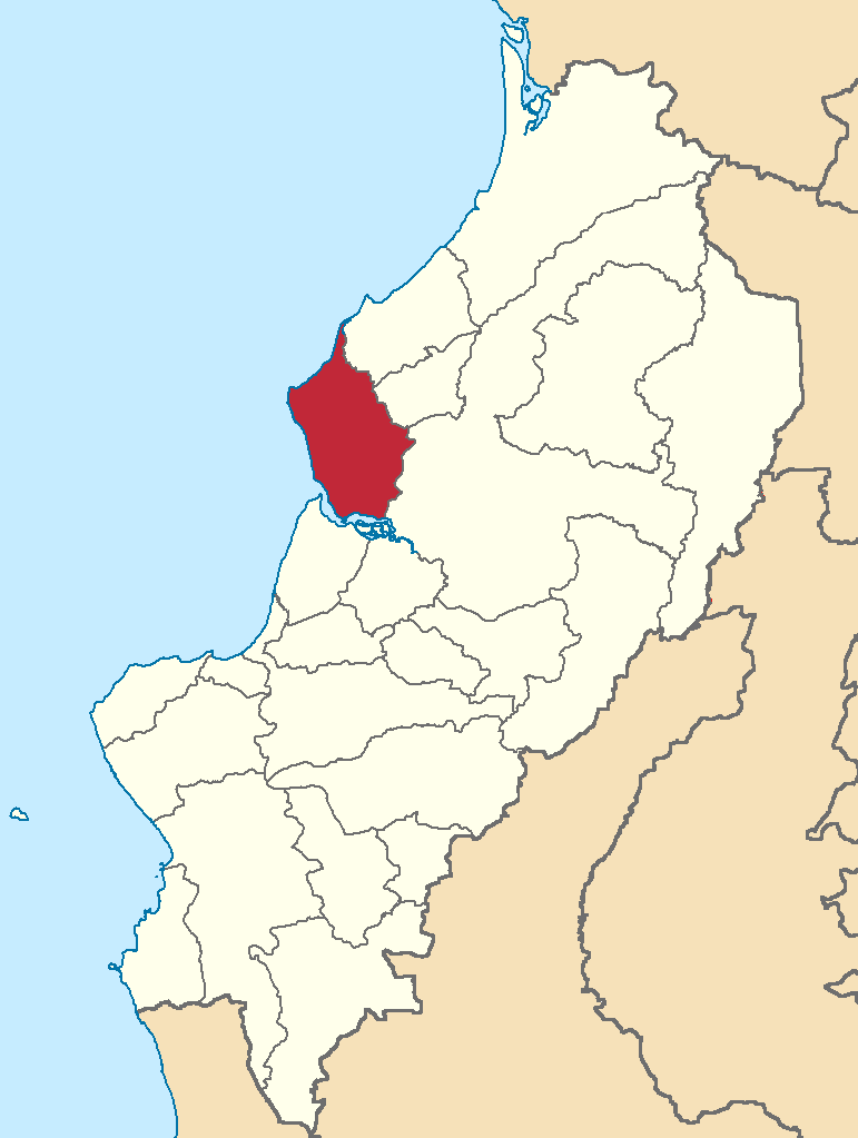 Mapa localizador del cantón en Manabí, Ecuador